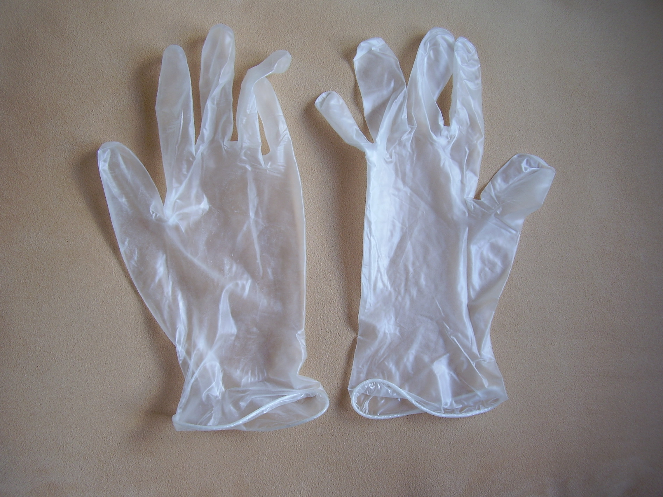 Disposable gloves; Einmalhandschuhe, medizinische Handschuhe; Vinylhandschuhe; Vinyluntersuchungshandschuhe, leicht gepudert, unsteril, zum Einmalgebrauch; Vinyl; aus PVC, mit den Weichmachern DEHP bzw. DINP (kazerogen, genschädigend)